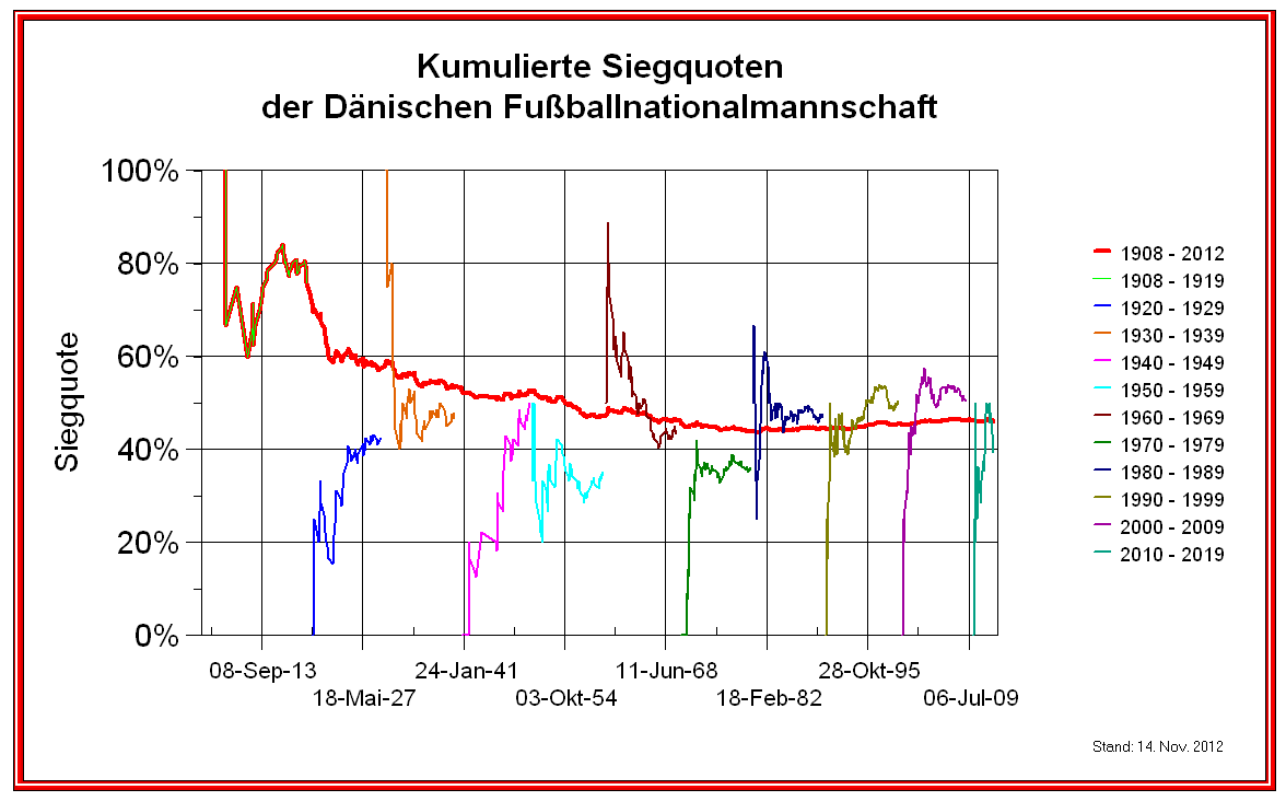 Kumulierte Siegquote der Dänischen Nationalmannschaft